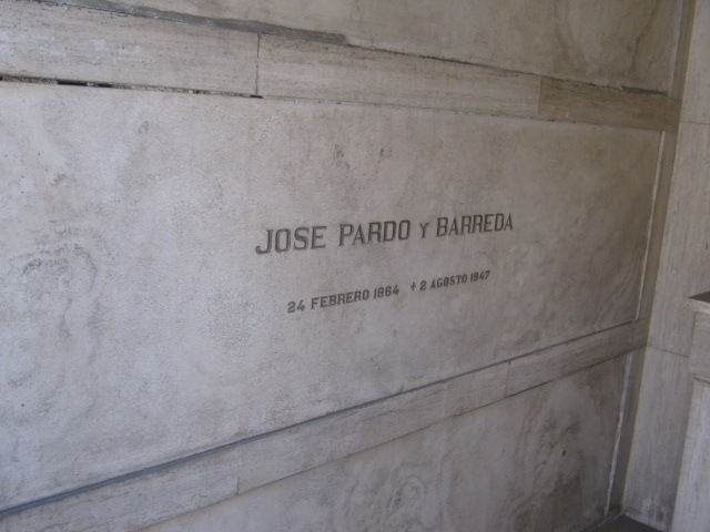 Tumba Jose Pardo Barreda